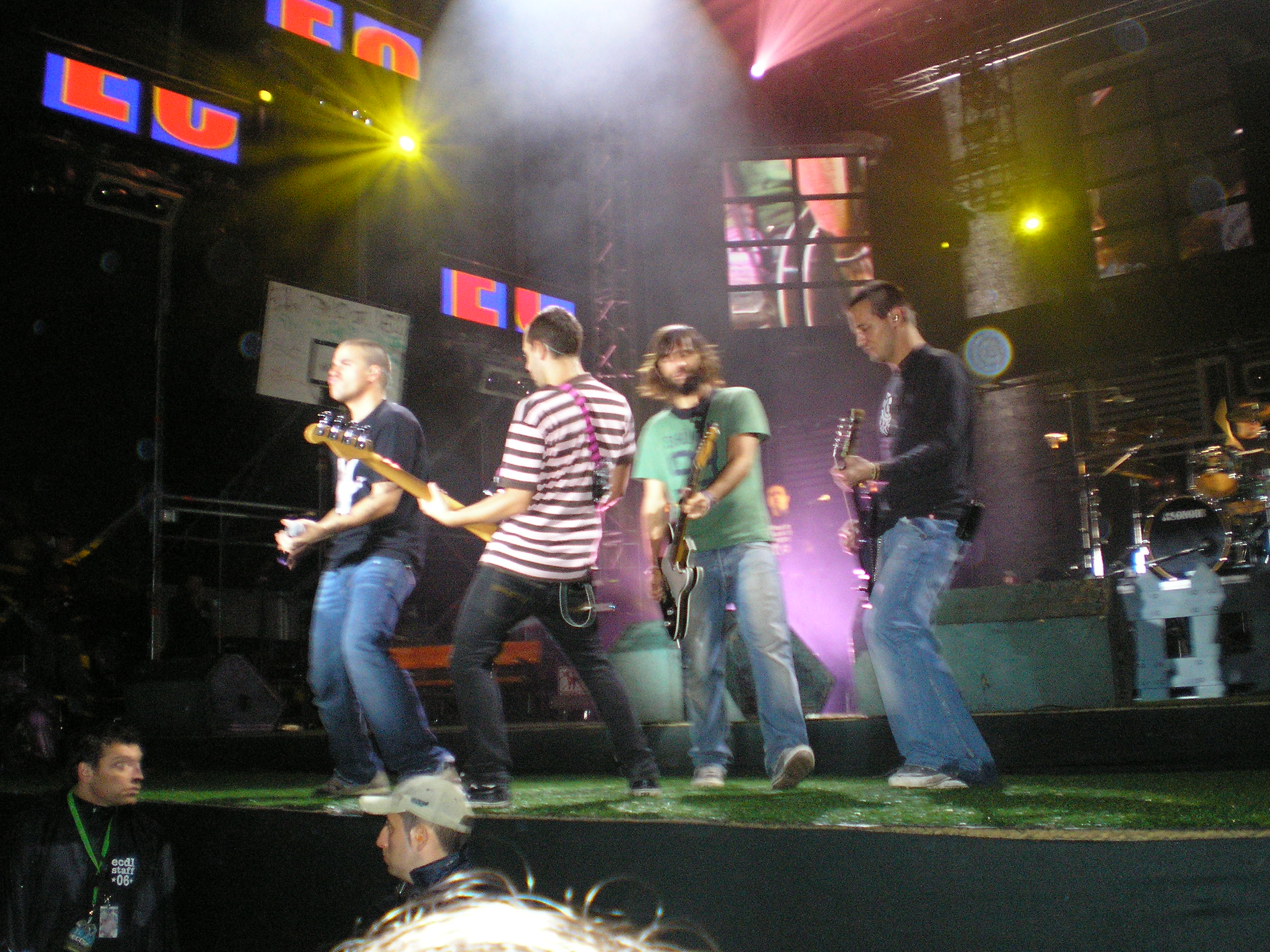 Concierto de San Mateo de ECDL en Oviedo.